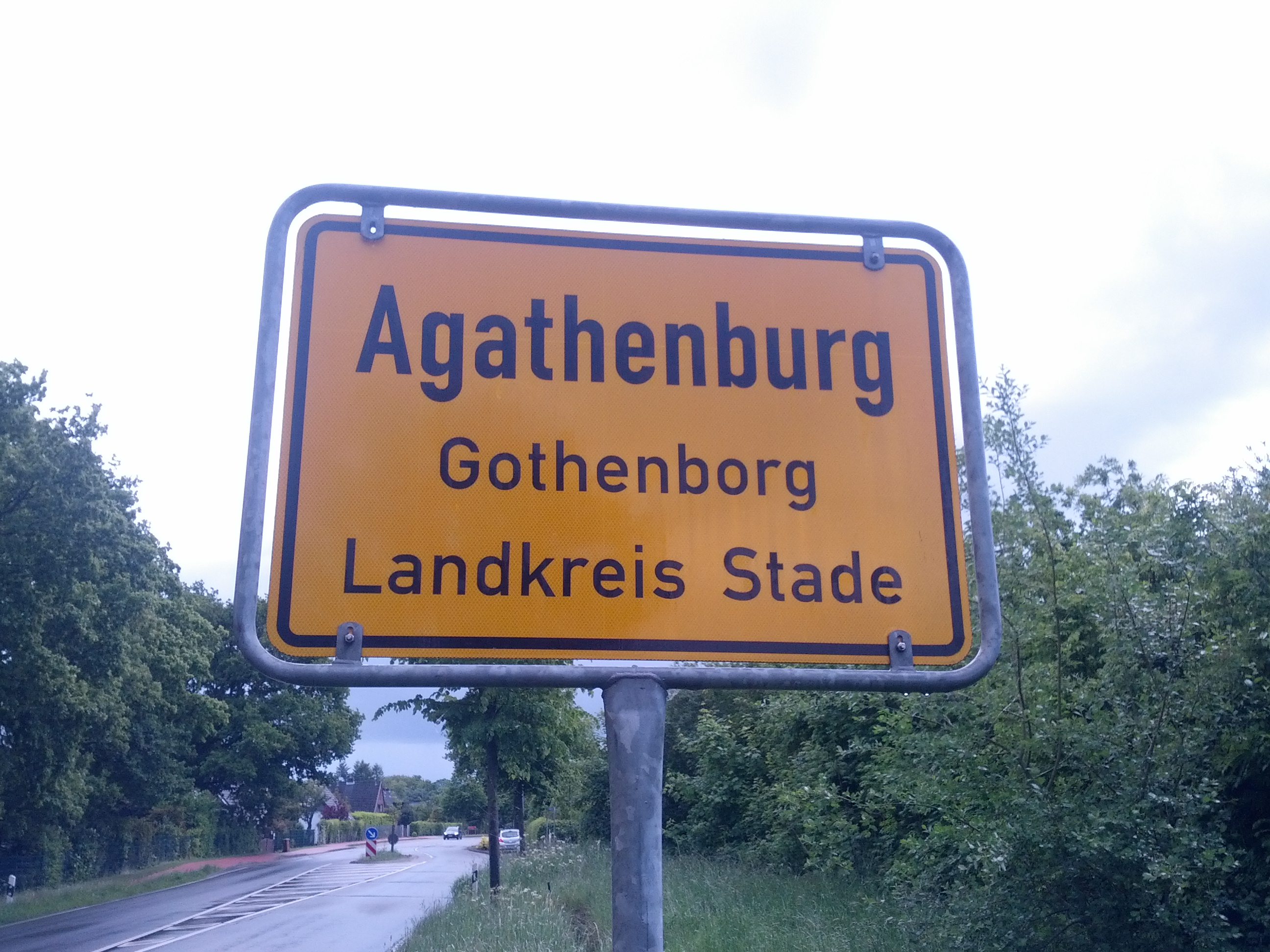 Ortsschild von Gothenborg, Landkreis Stood, mit den Naam op Hoochdüütsch un op Plattdüütsch